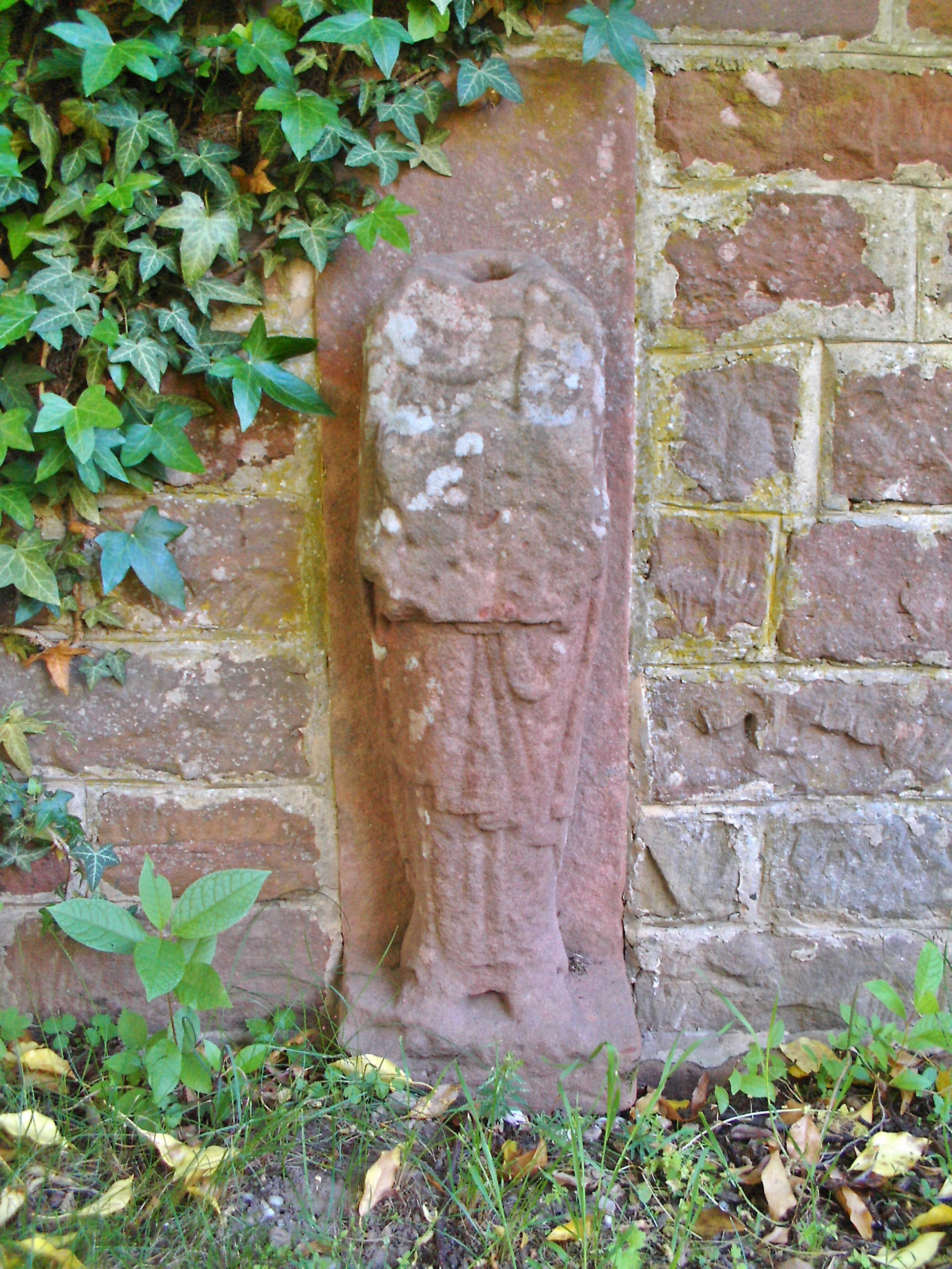 Kloster Höningen, Pfalz, Figurenspolie (ohne Kopf), eingelassen in Mauer des heutigen Friedhofes